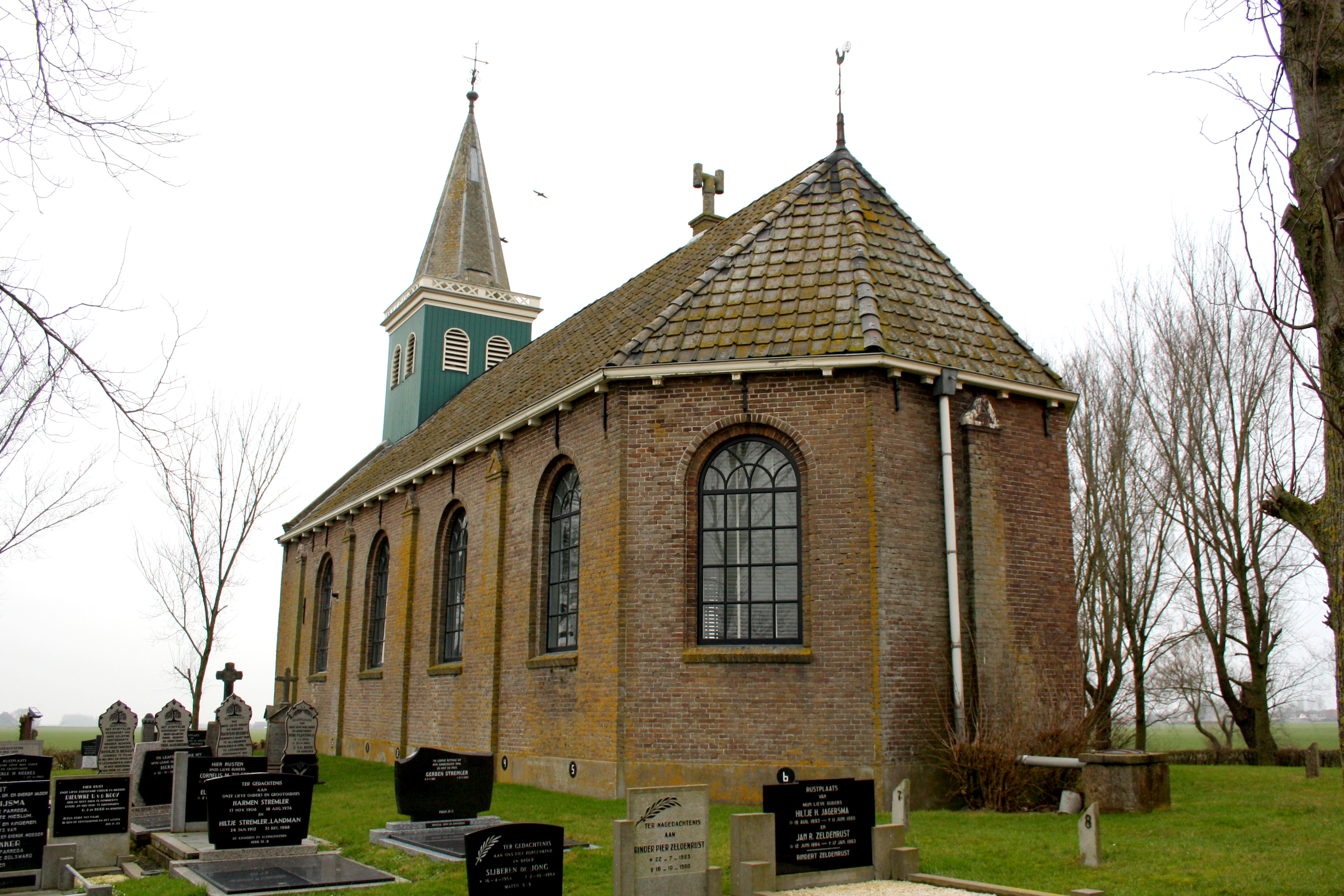 Hieslum (Fr) - Herv. kerk uit 1874